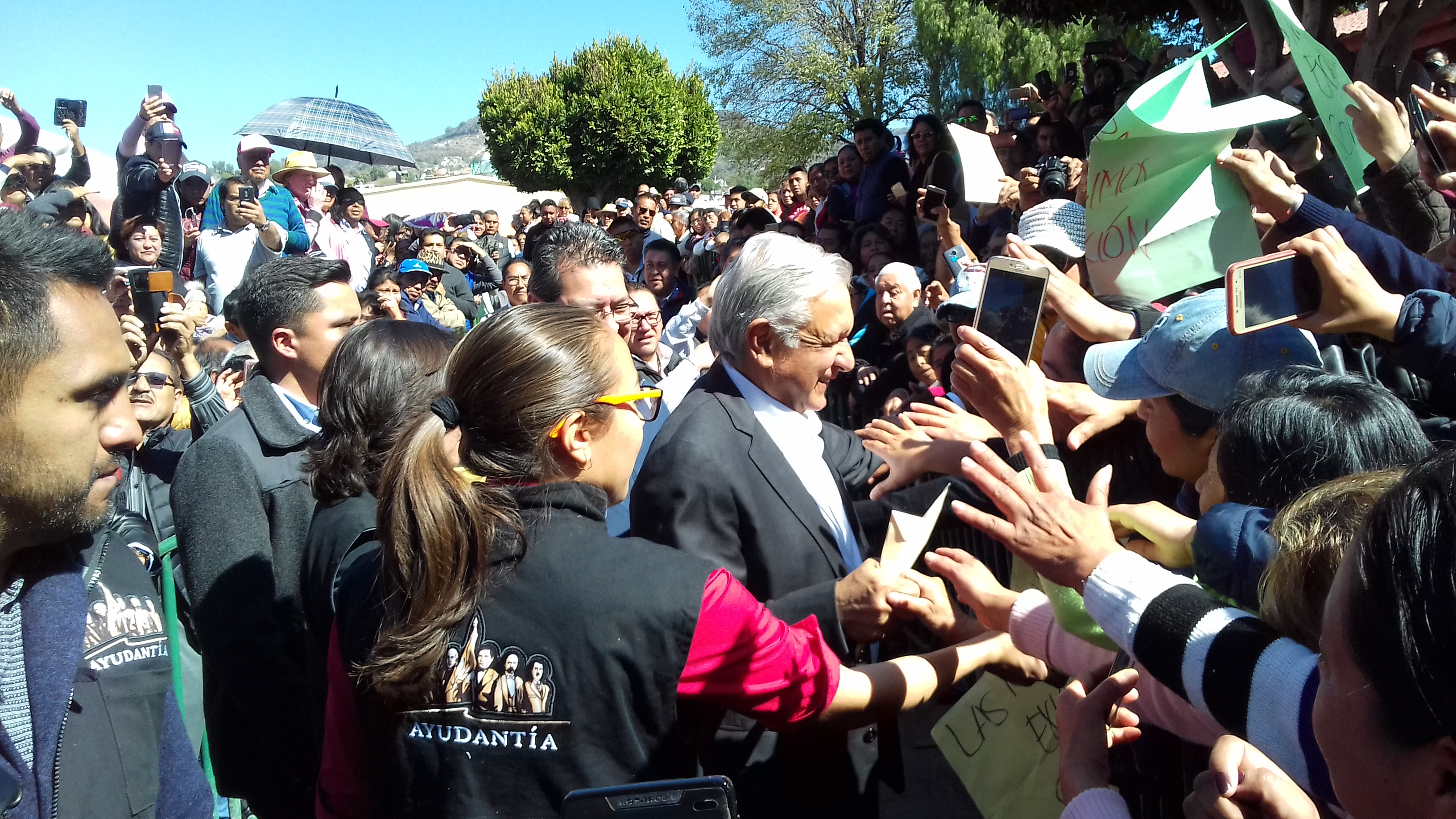 Presidente López Obrador en Tlaxcala 31-Enero-2019